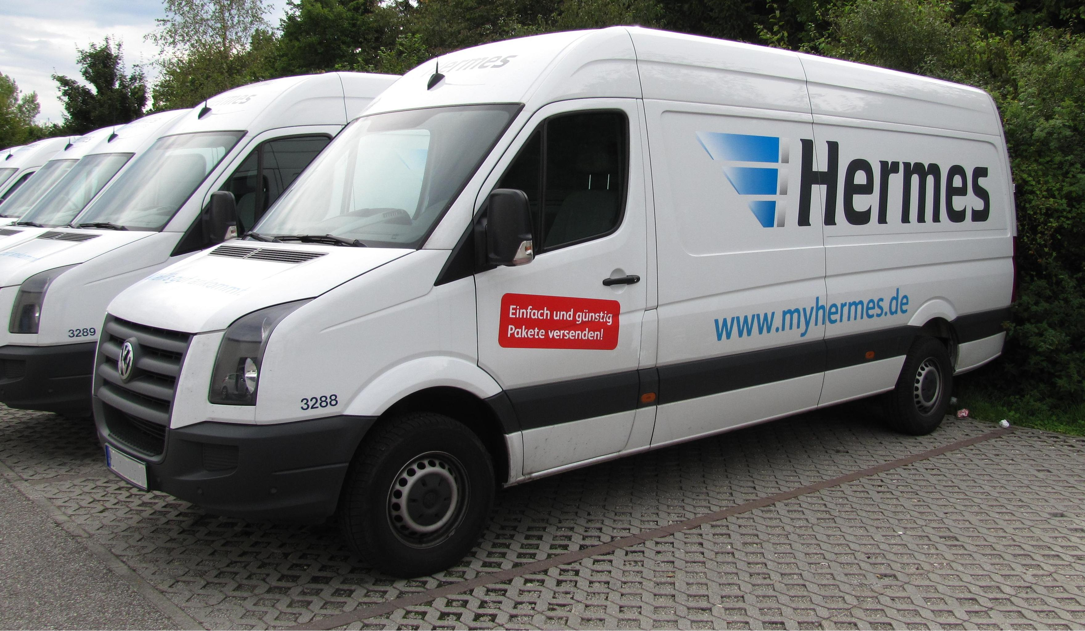 Fuhrpark der Hermes Europe